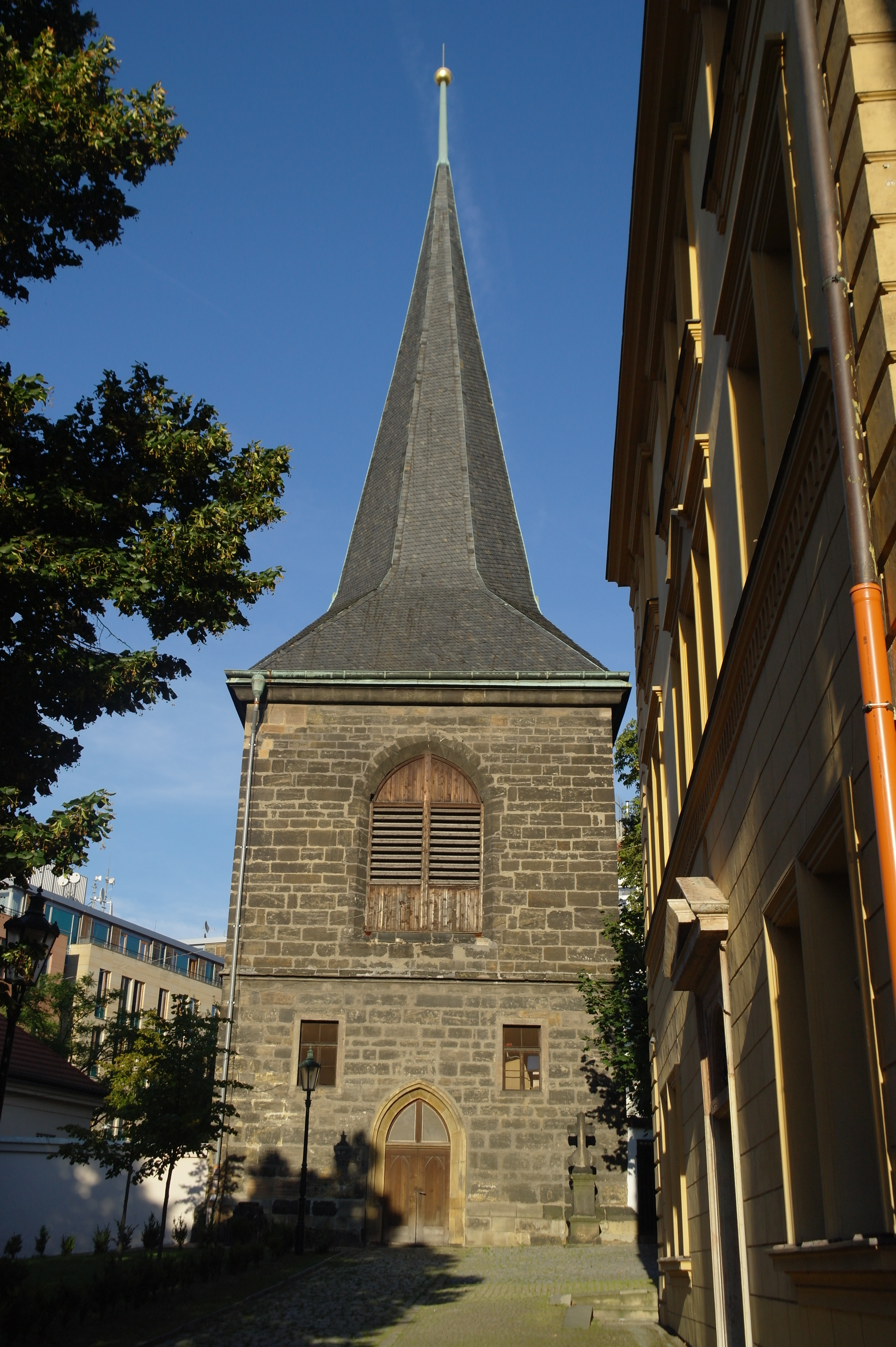 Zvonice kostela sv. Štěpána v Praze na Novém Městě, vpravo budova bývalého špitálu